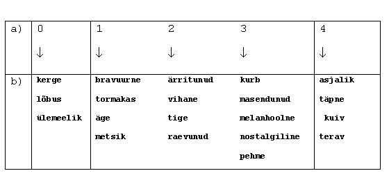 Rida karakteri parameetris: a) rea elemendi number, karakteri transformatsiooni suund elemendi siseselt, b) karakterid. Toimub karakterite järk-järguline transformatsioon kergest, lõbusast, ülemeelikust vihase kaudu kuivaks